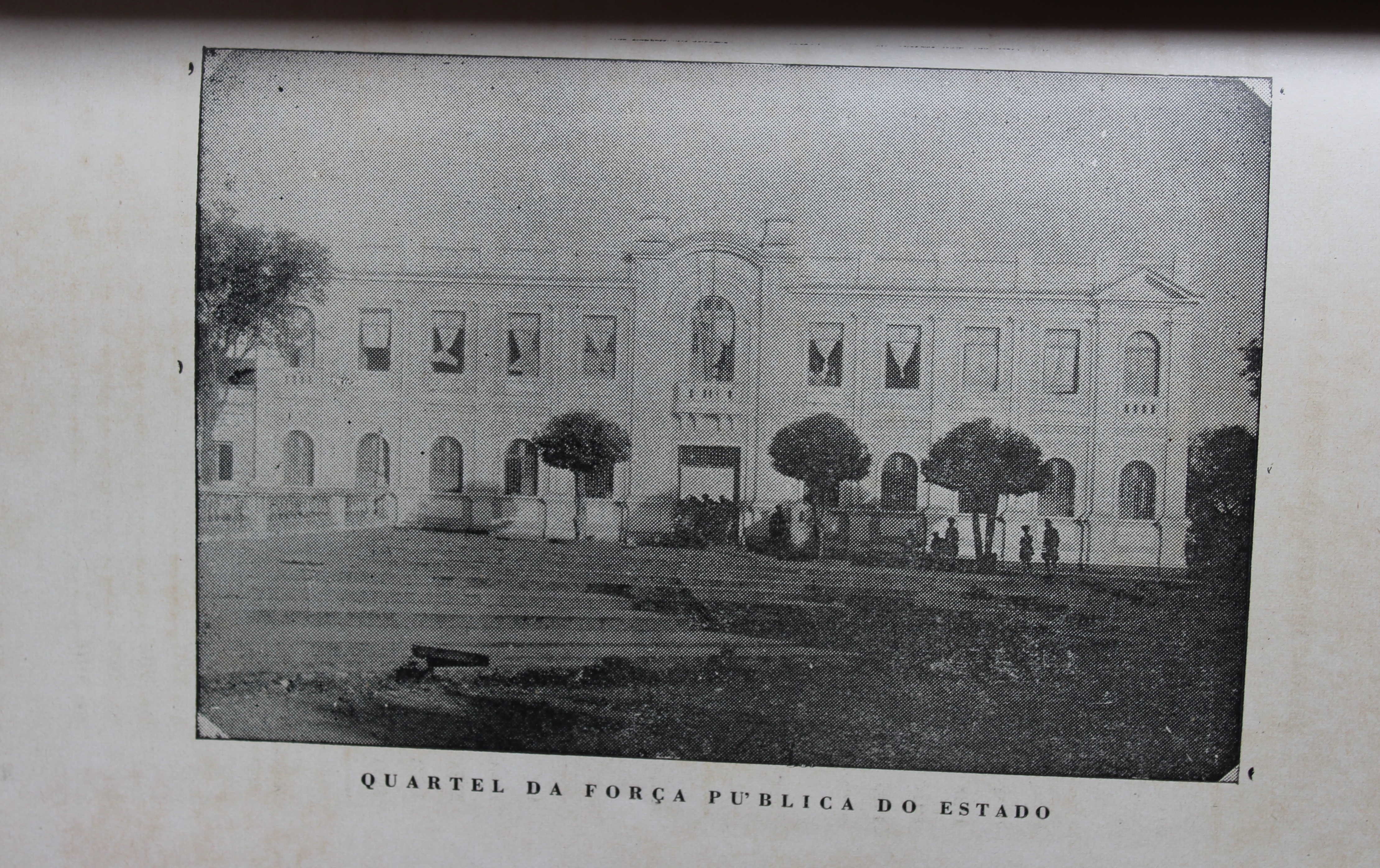 Fotografia do quartel da Força Pública (atual PM do Piauí) no Anuário Piauí 1935, publicação da então Diretoria Geral de Estatísticas do Estado do Piauí e impresso pela antiga Imprensa Oficial.